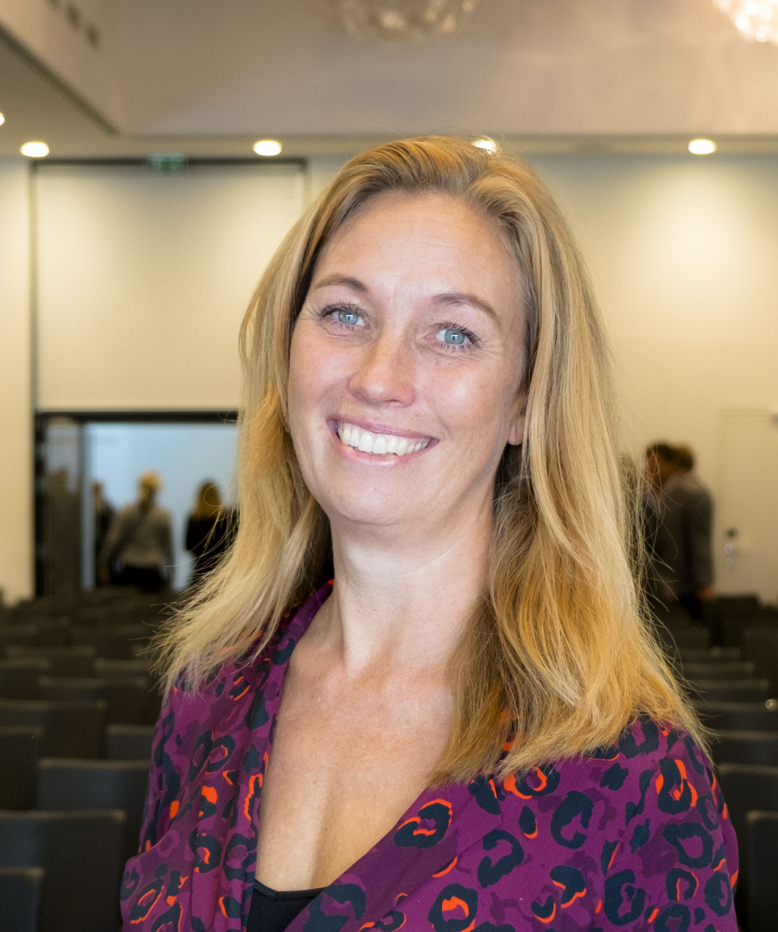 Emma Kronqvist ved Copenhagen TV Festival. Foto: News Øresund – Sofie Paisley © News Øresund (CC BY 3.0). Detta verk av News Øresund är licensierat under en Creative Commons Erkännande 3.0 Unported-licens (CC BY 3.0). Bilden får fritt publiceras under förutsättning att källa anges. .The picture can be used freely under the prerequisite that the source is given. News Øresund, Malmö, Sweden News Øresund är en oberoende regional nyhetsbyrå som är en del av det oberoende dansk-svenska kunskapscentrat Øresundsinstituttet.. .